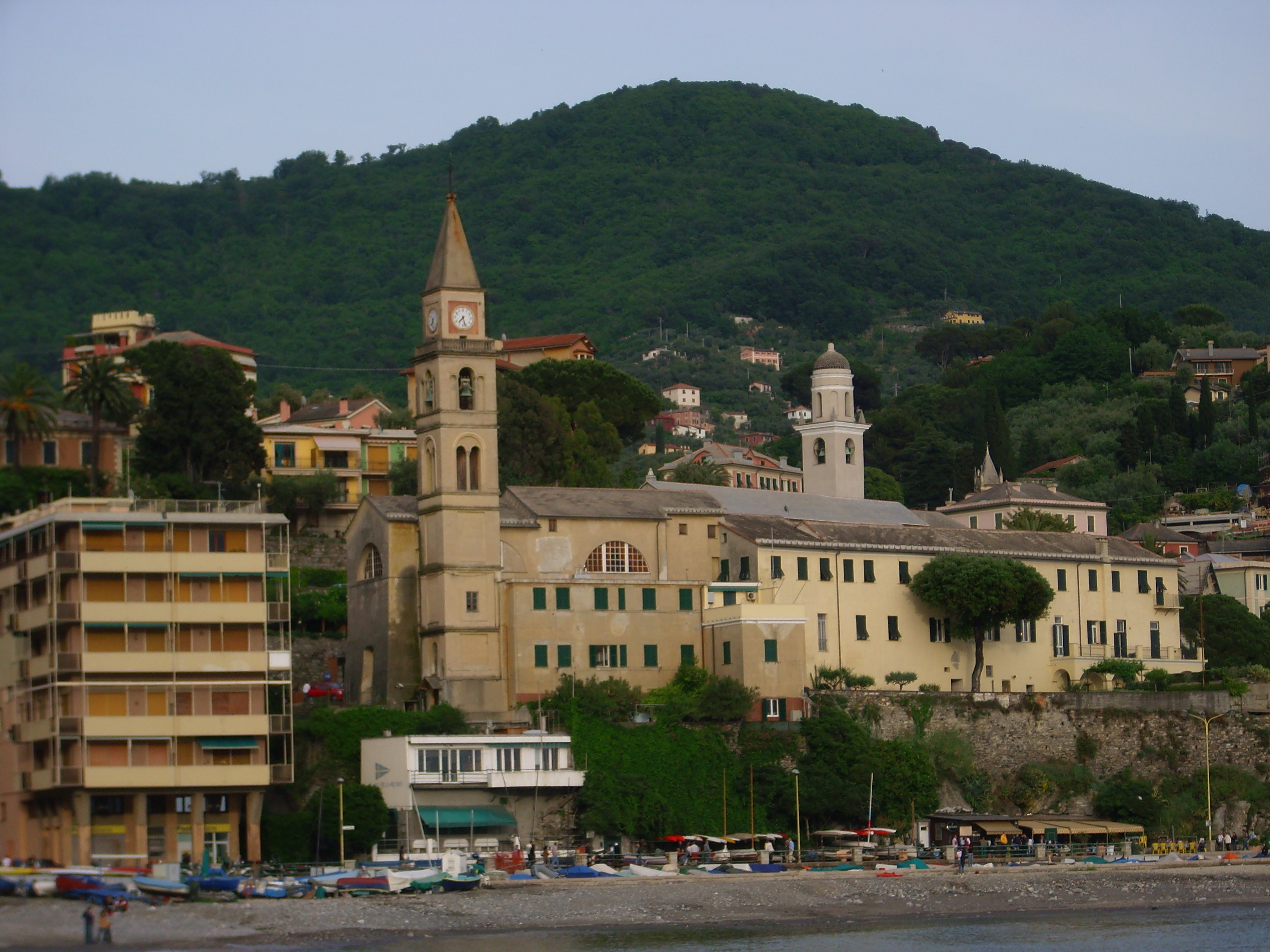 Il convento di San Francesco a Recco